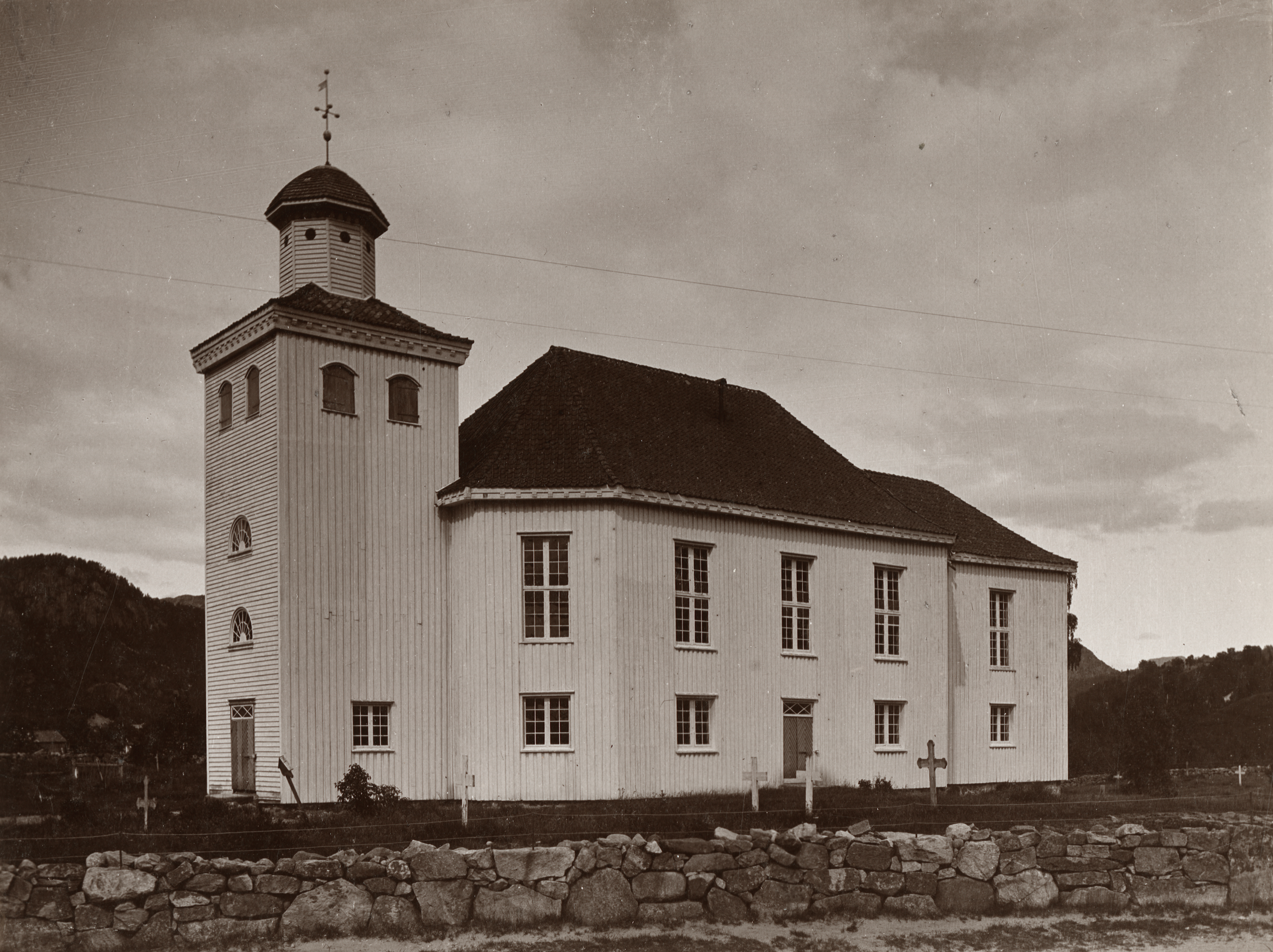 Kvinesdal kirke i Kvinesdal - Liknes, Vest-Agder This image on crowdsourcing geotagging platform Fotodugnad